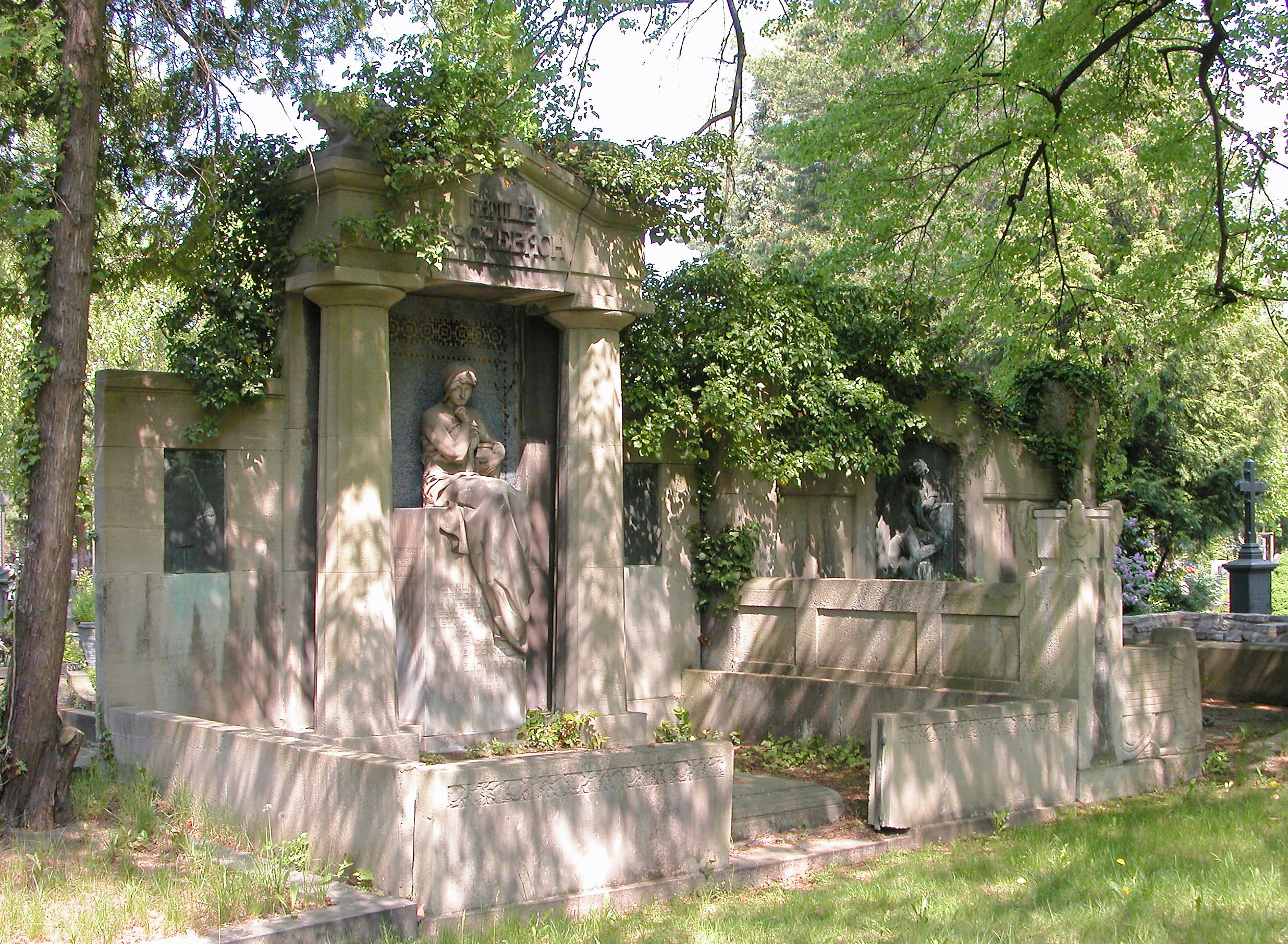 12.05.2006 01270 Dresden-Tolkewitz: Johannisfriedhof. Grabstelle Eschebach. Königl. sächs. geheimer Comerzienrat Carl Eschebach (04.05.1842 - 08.12.1905). [DSCN10016.TIF]20060512035.JPG(c)Blobelt